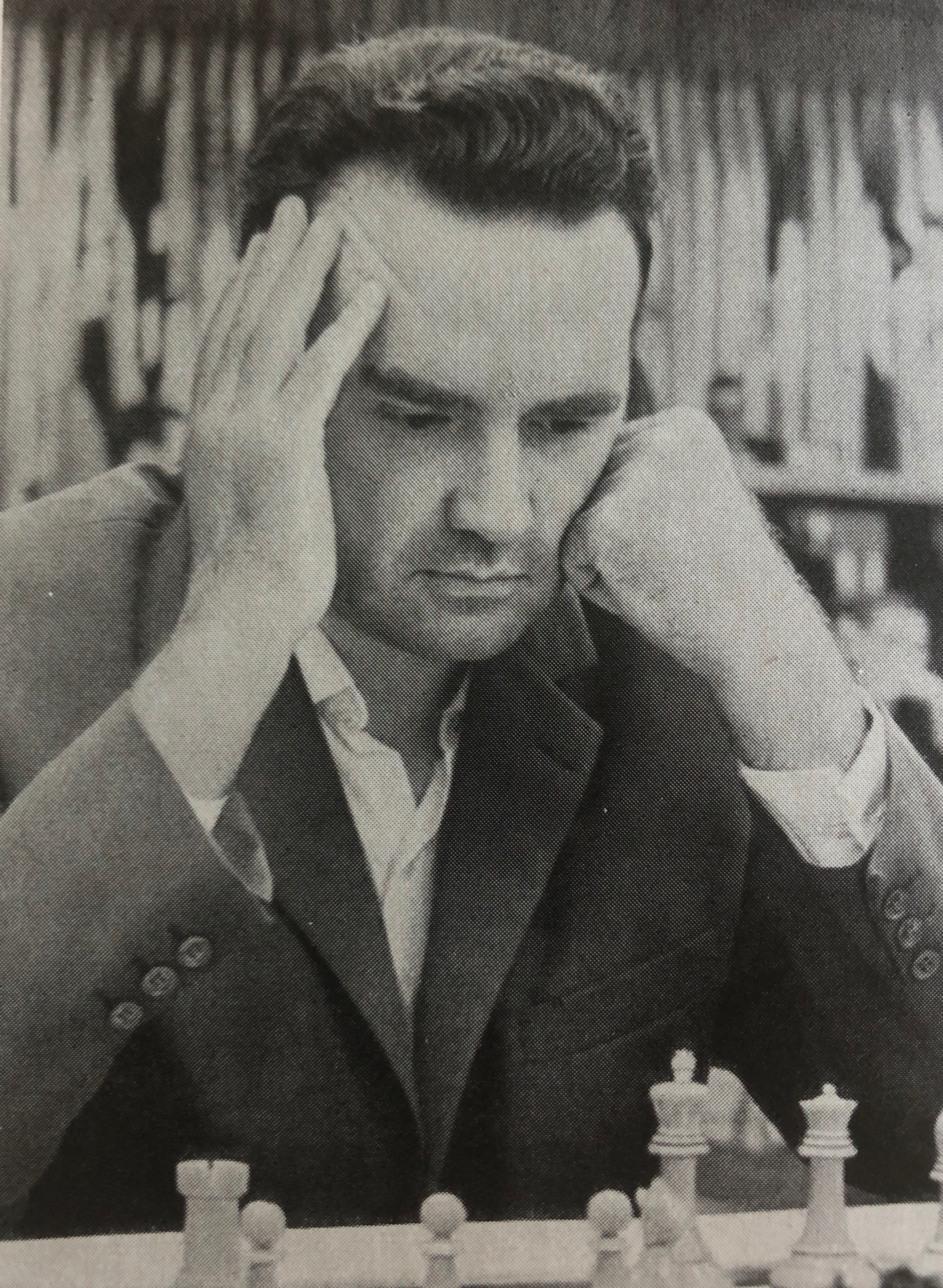 XVII Schacholympiade Havanna 1966